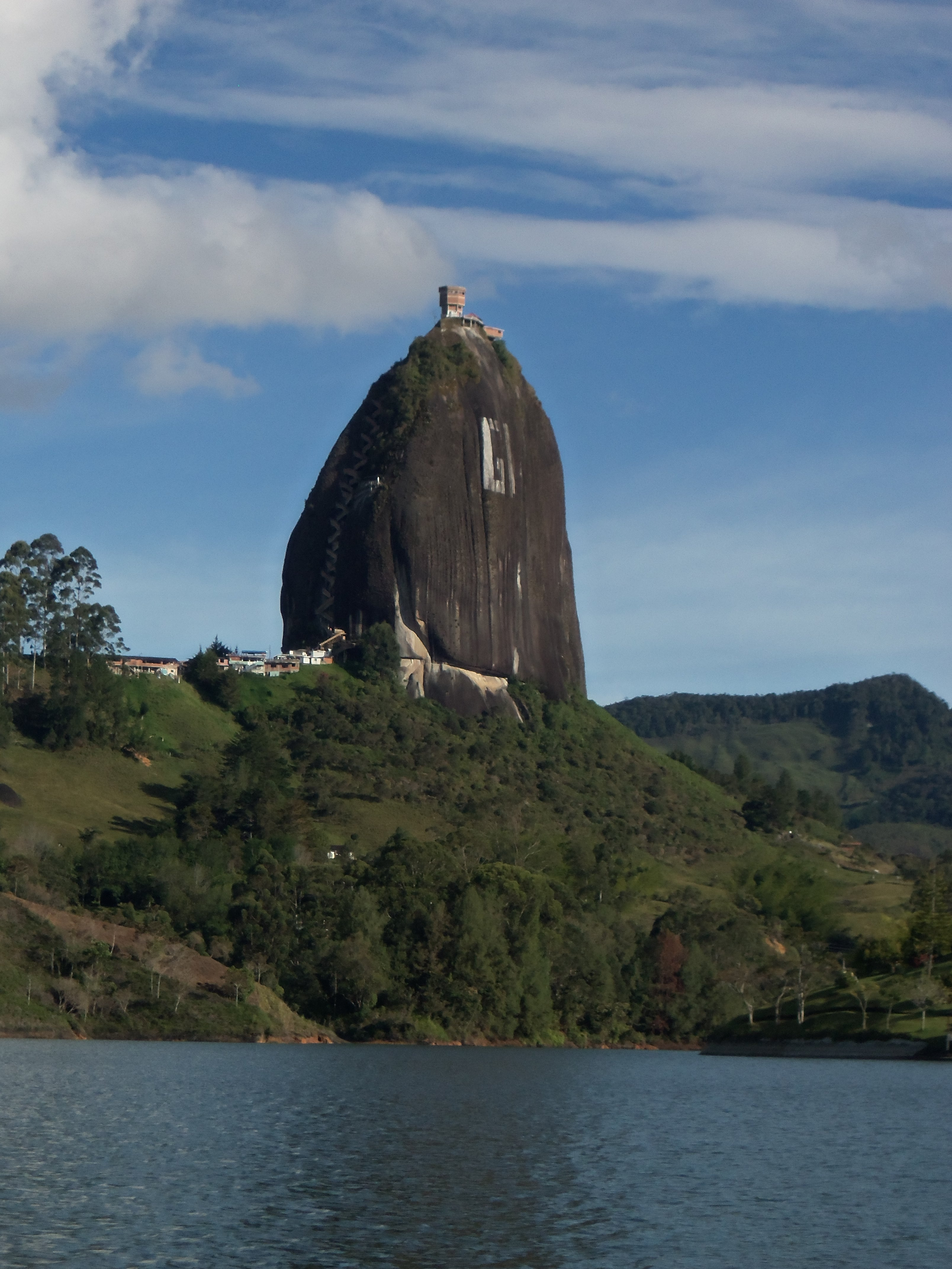 La piedra del penol